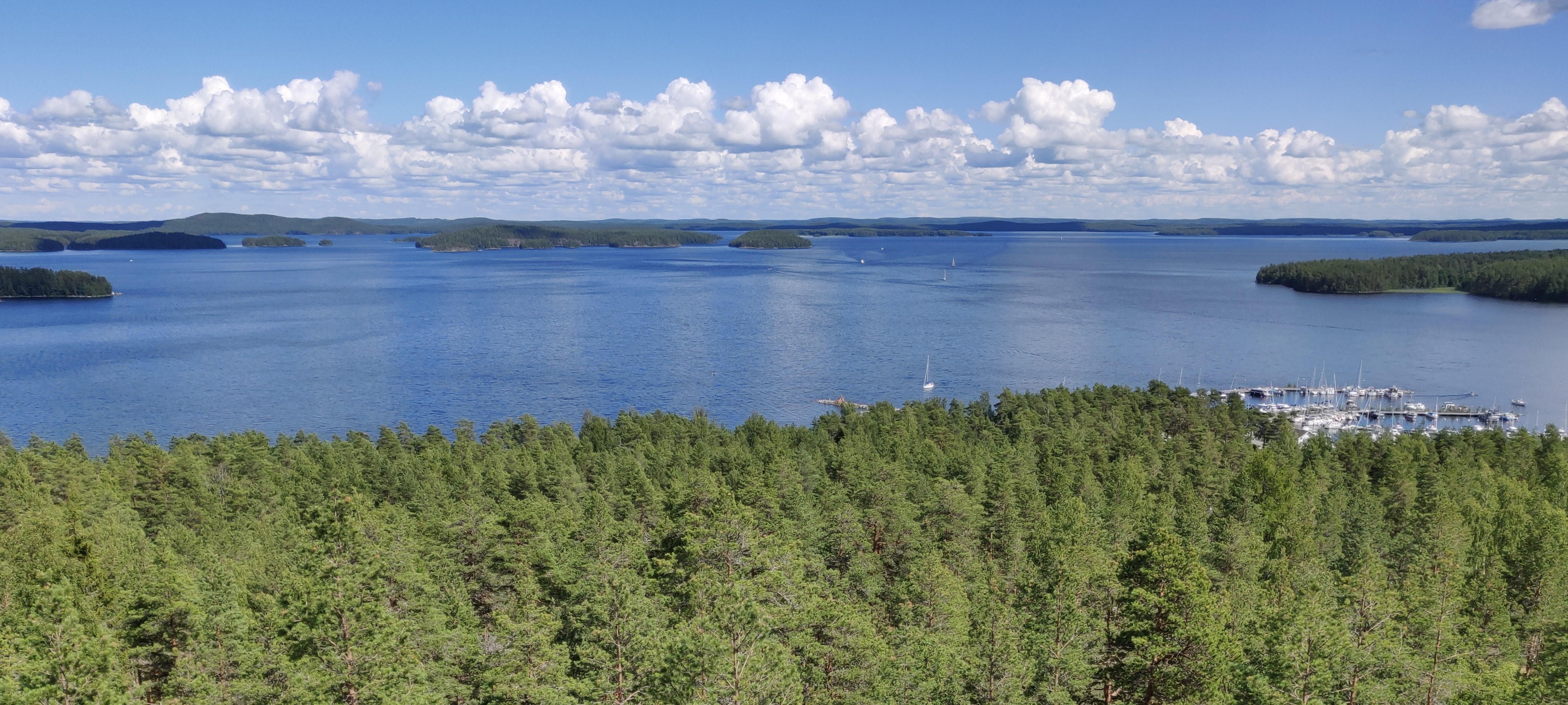 Näkymä Padasjoen Tuomastornin huipulta. Kuvassa näkyy saaria ja Päijänne.